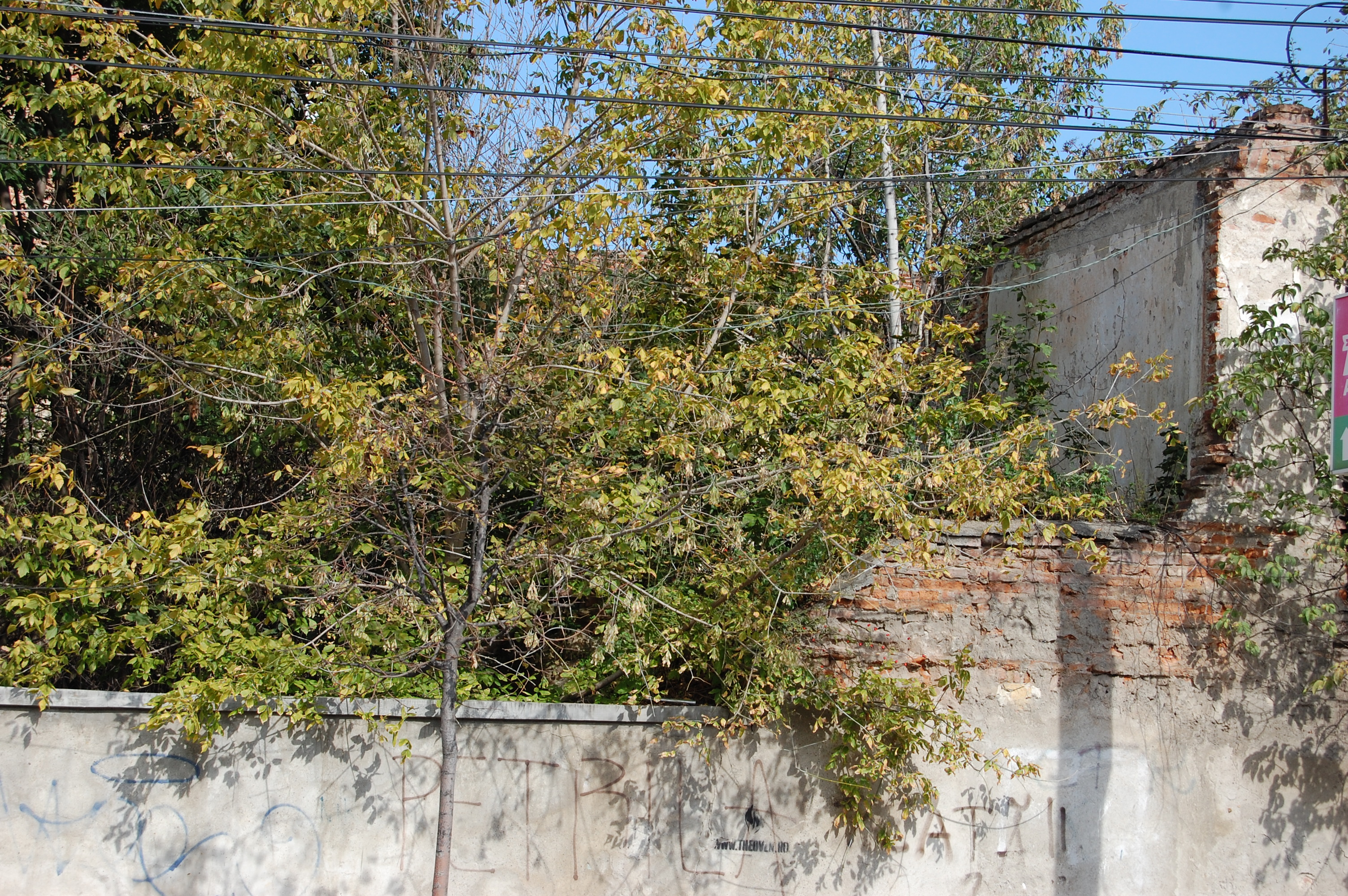 Zidul rămas din monumentul istoric, după distrugerea de ocupanţii ilegali în anii 1990.